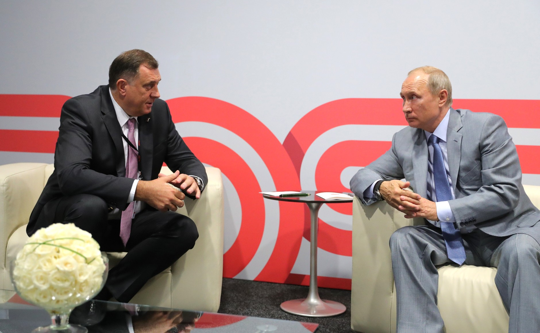 Встреча Президента Российской Федерации Владимира Путина с Президентом Республики Сербской Боснии и Герцеговины Милорадом Додиком.